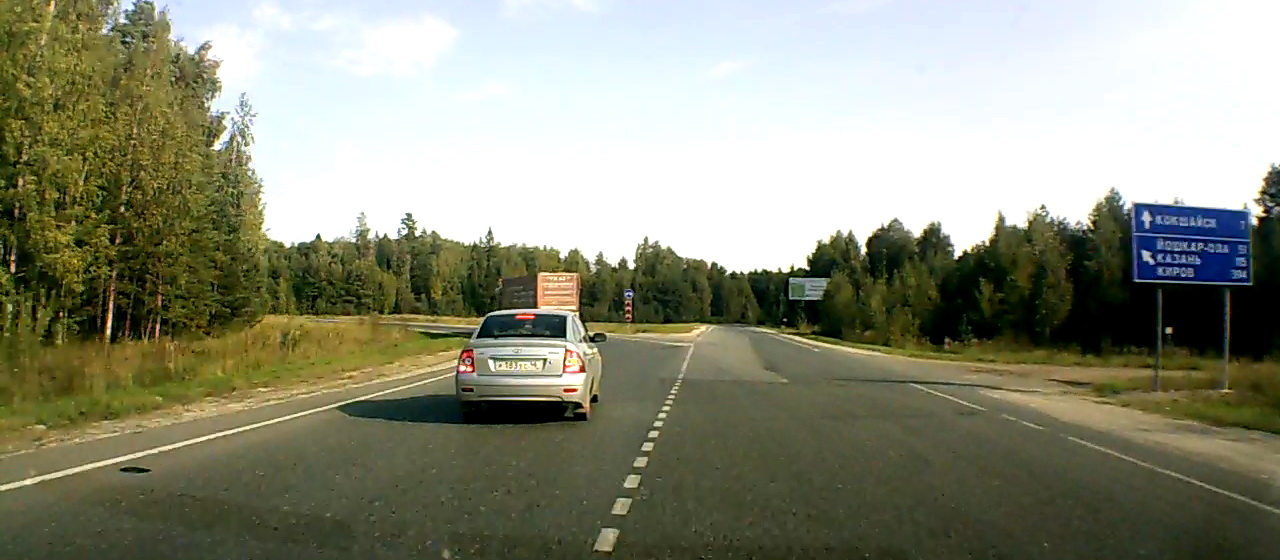 Круговое движение на автодороге